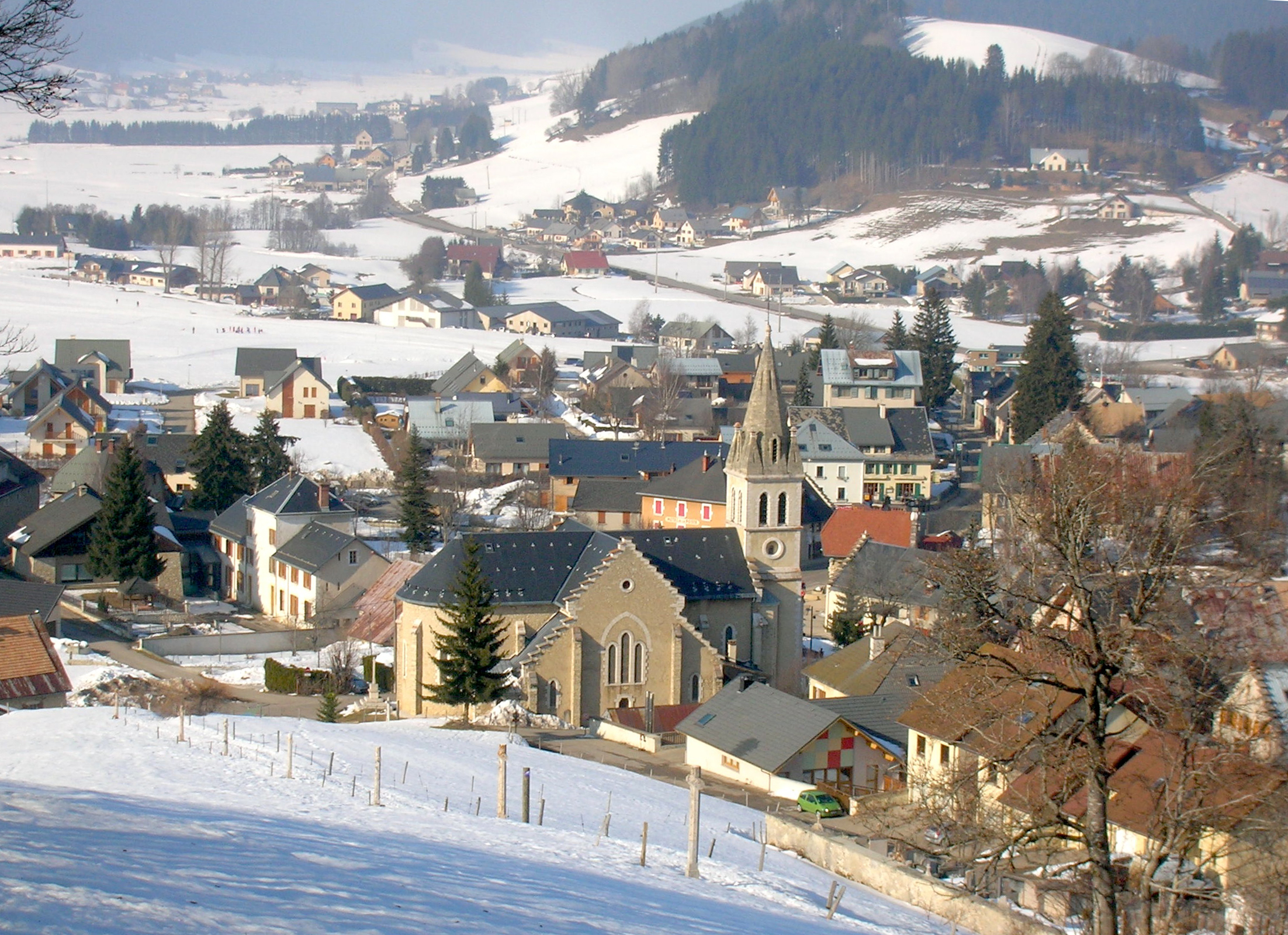 Méaudre, Autrans-Méaudre-en-Vercors, Isère, AuRA, France.